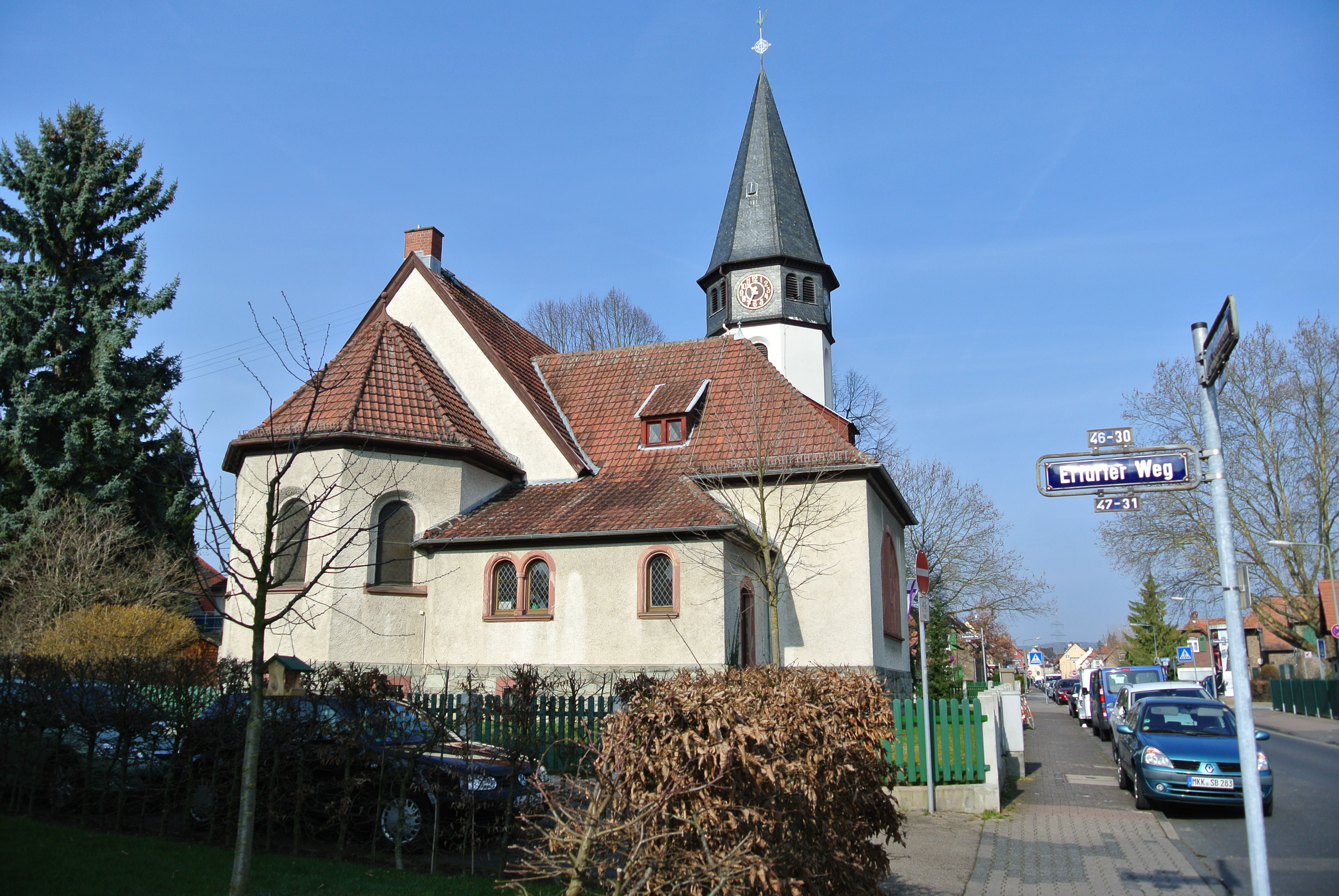 Evangelische Kirche Frankfurt-Zeilsheim, Frankenthaler Weg, im Sitl des Historismus, Ansicht von Osten